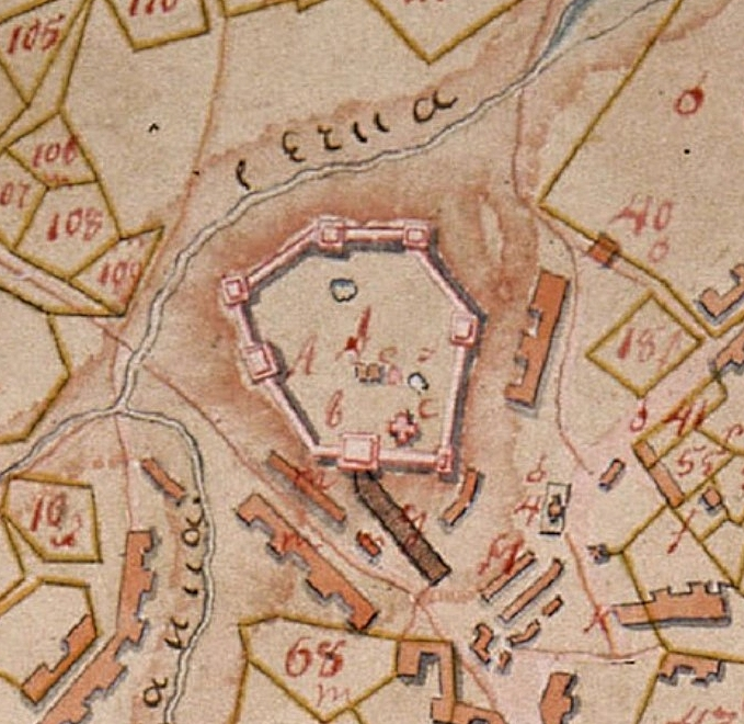 План Колобова